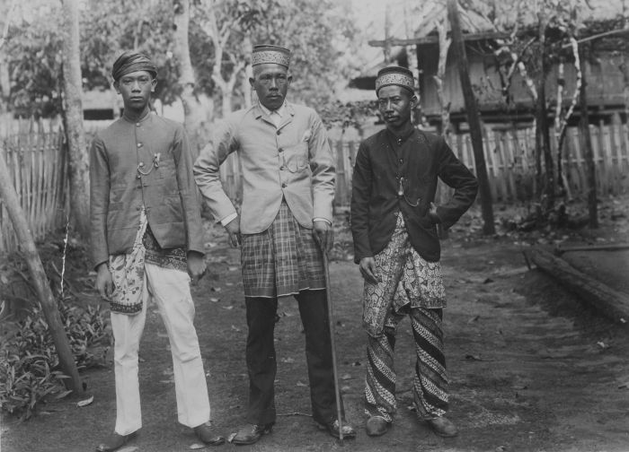 foto. Portret van een dorpshoofd met gevolg uit een dorp bij de rivier Wai Oempoe in de Lampongse districten